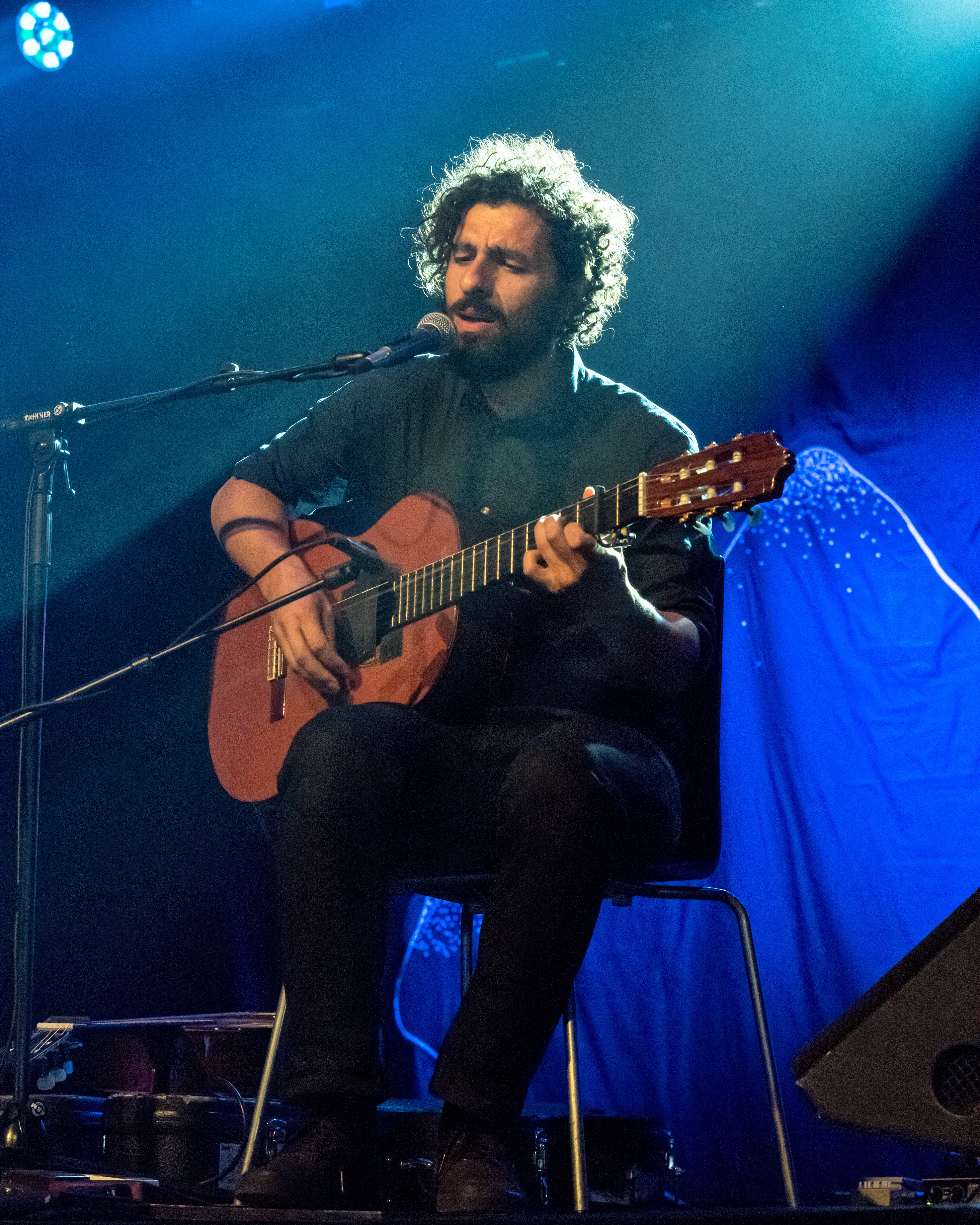 Bilder vom Zelt Musik Festival 2017 in Freiburg im Breisgau José González am 13.07.2017